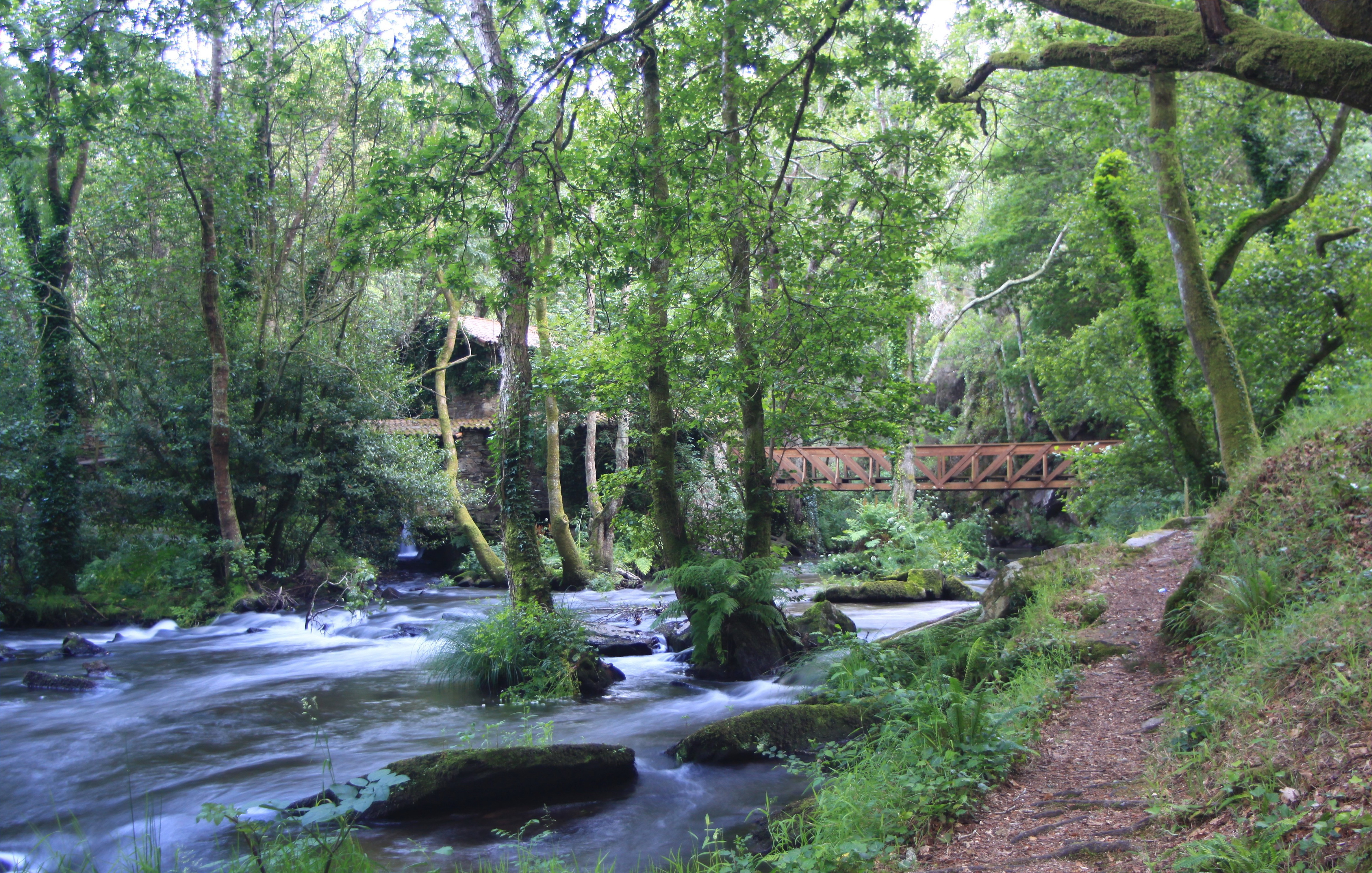 Refugio de Verdes - Coristanco - Galiza - 12 de xuño de 2009 El Refugio de Verdes está situado en una zona de pequeños islotes y caídas de agua que fue convenientemente aprovechada para la construcción de molinos harineros, usando la fuerza del agua para mover todo el mecanismo. Además de la belleza tradicional de las construcciones, recuperadas con gusto, está también la propia belleza del lugar, distinta e igualmente arrebatadora en cualquier época del año, gracias a los robles que cubren toda la zona.